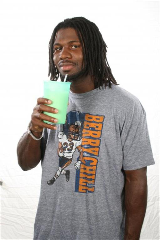 Devin Hester